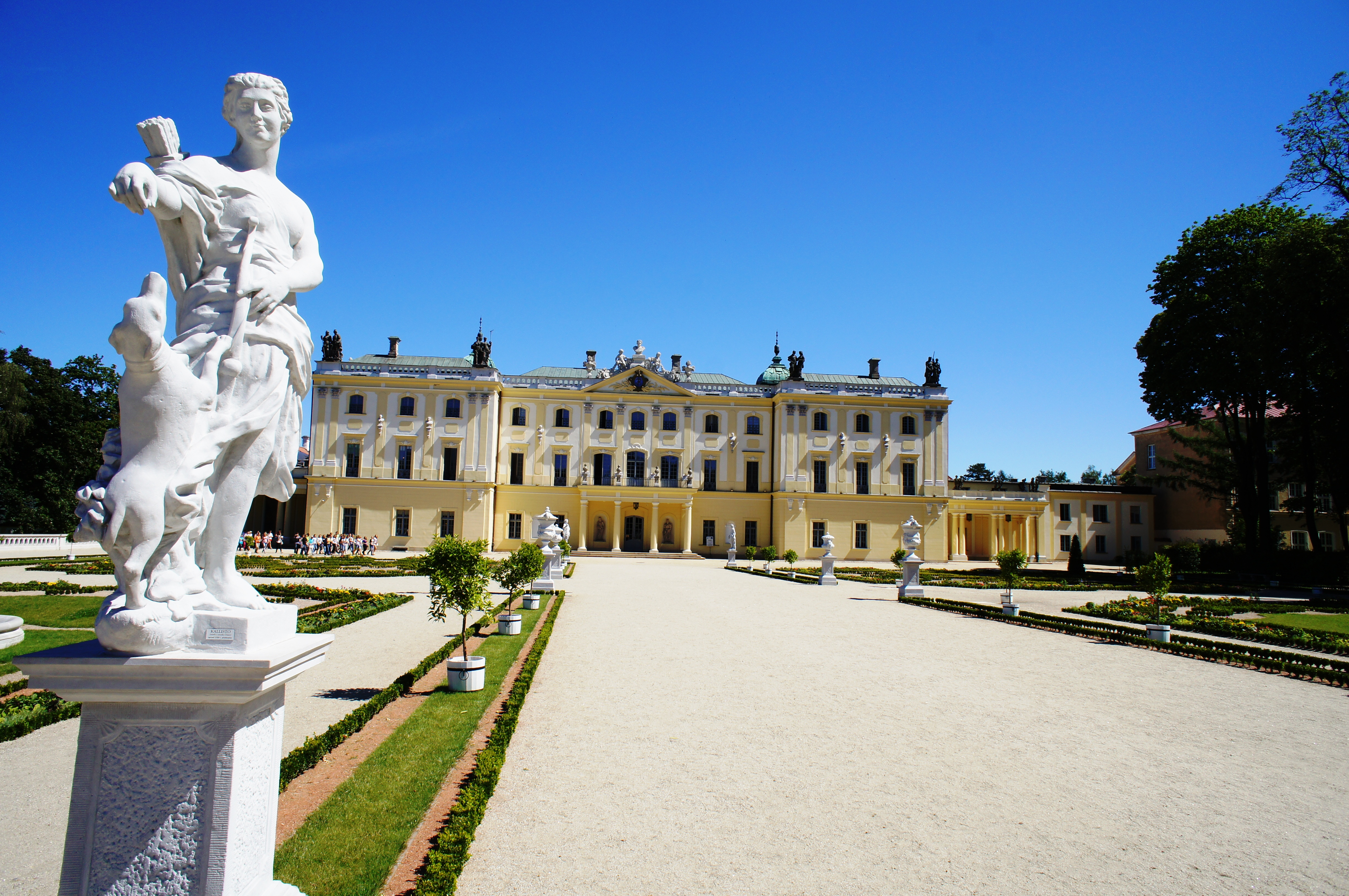 Pałac Branickich w Białymstoku (elewacja ogrodowa) A-252 z 1.12.1958 -Magrys